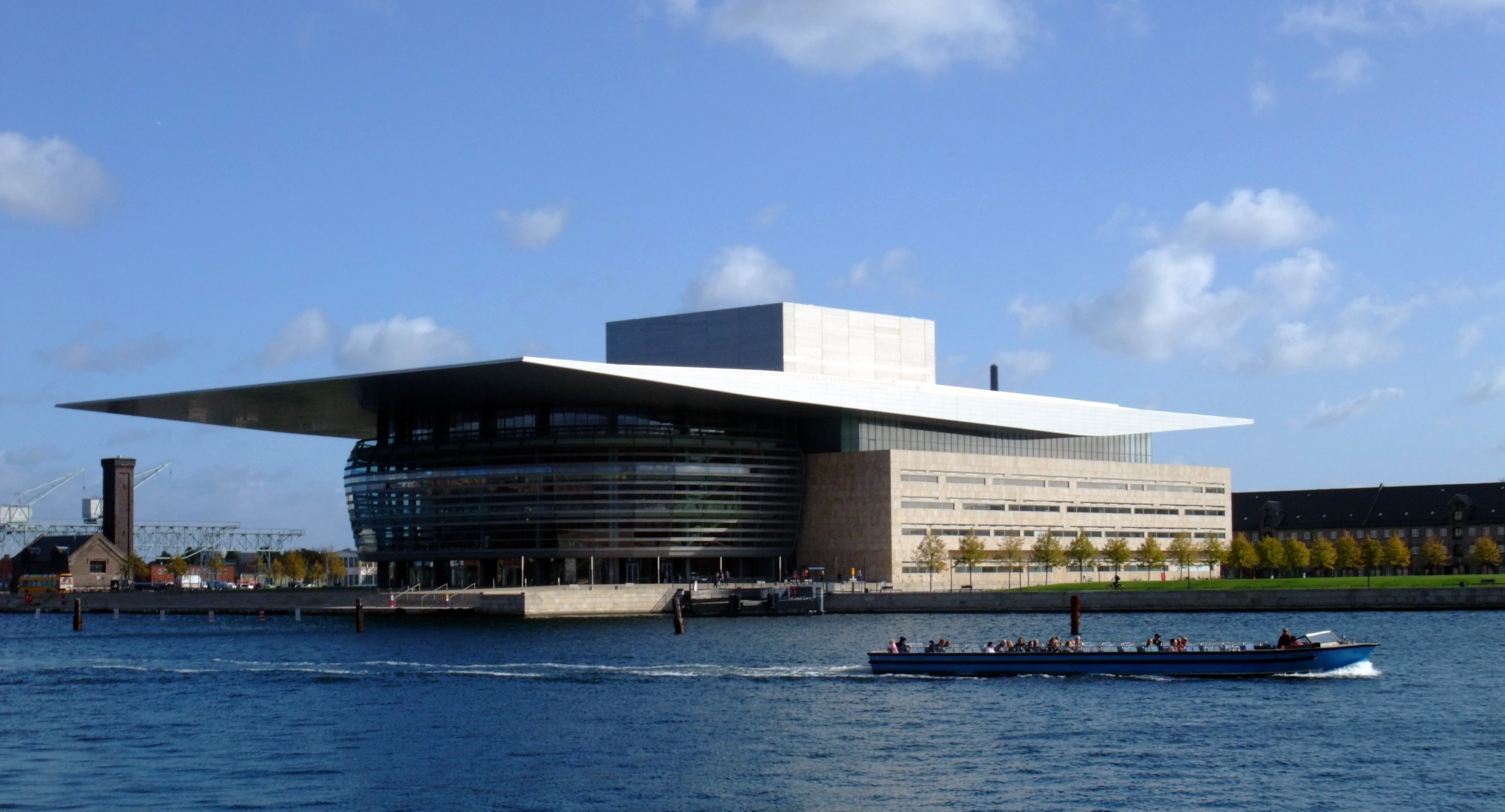 Copenhagen Opera House - side view